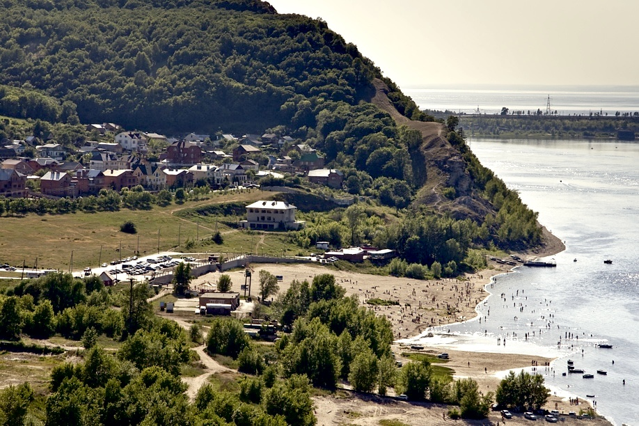 Пляж у села Моркваши, Самарская область